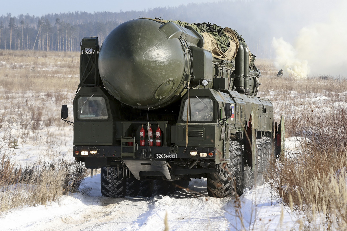 Полевой выход 29-й гвардейской ракетной Витебской дивизии.